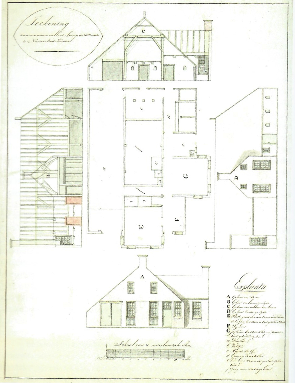 Bouwtekening Verlaatshuis van het Springersverlaat of Eerste Verlaat in Stadskanaal